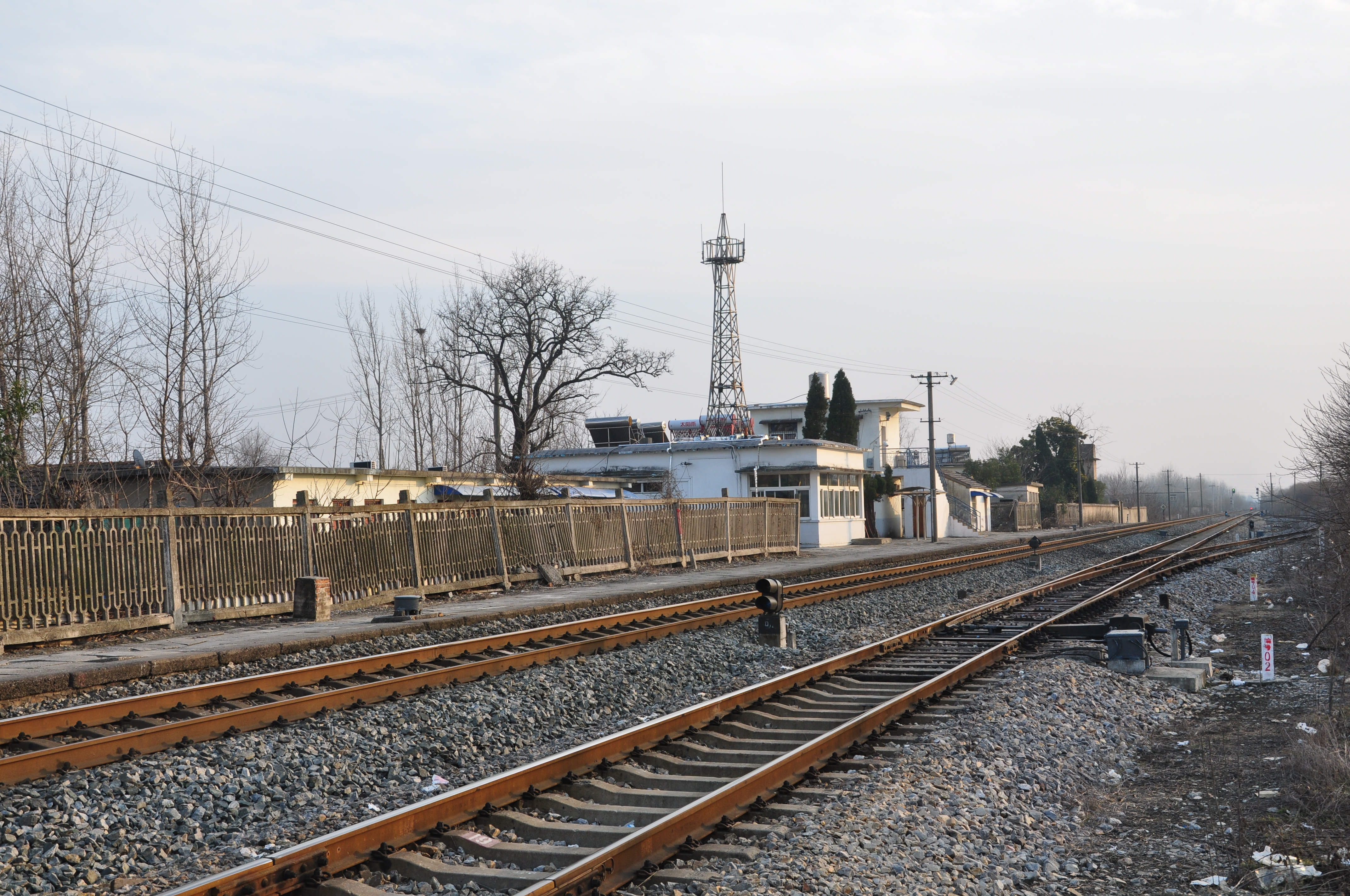 中文（中国大陆）: 水蚌铁路姜桥站